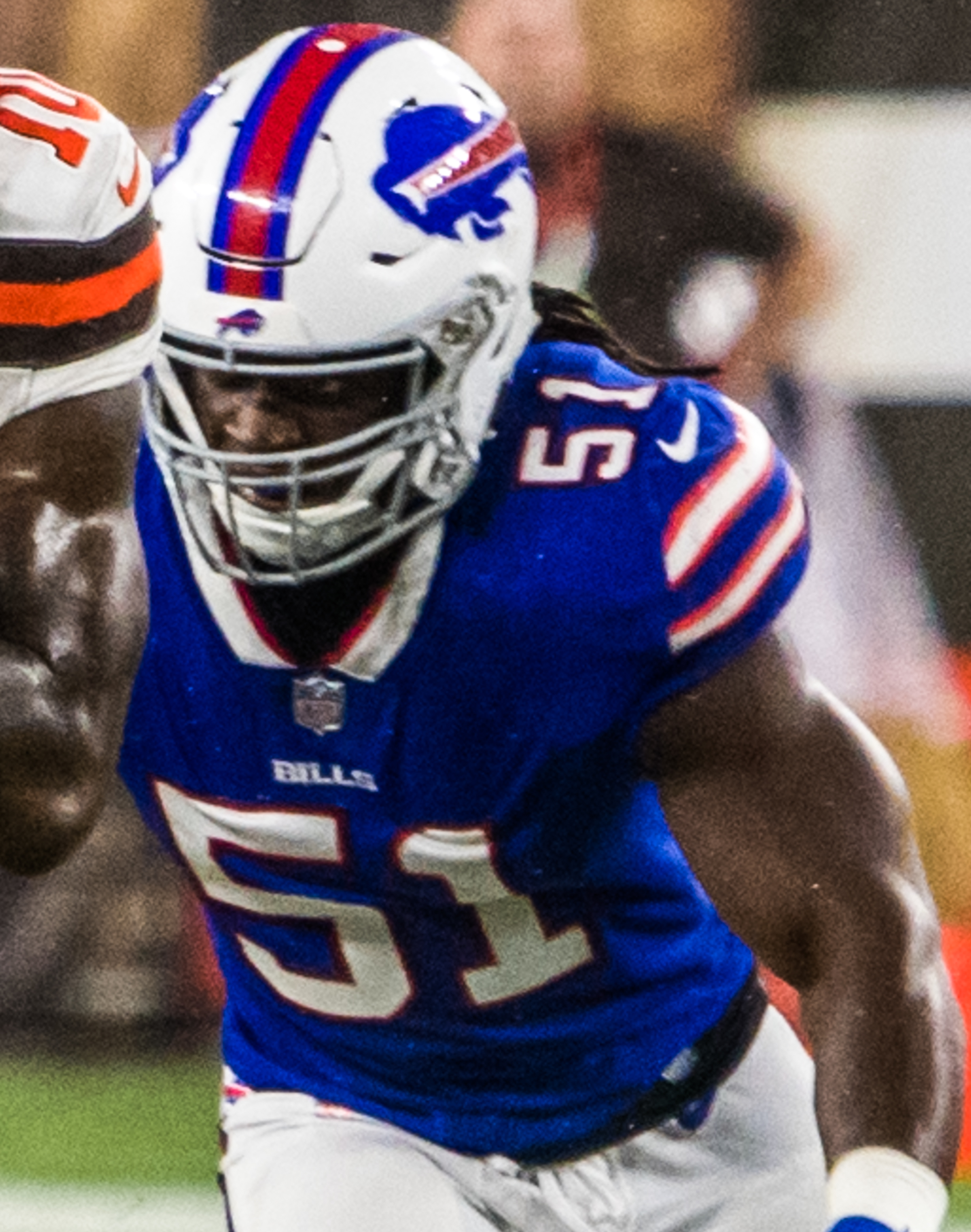 Da'Mari Scott